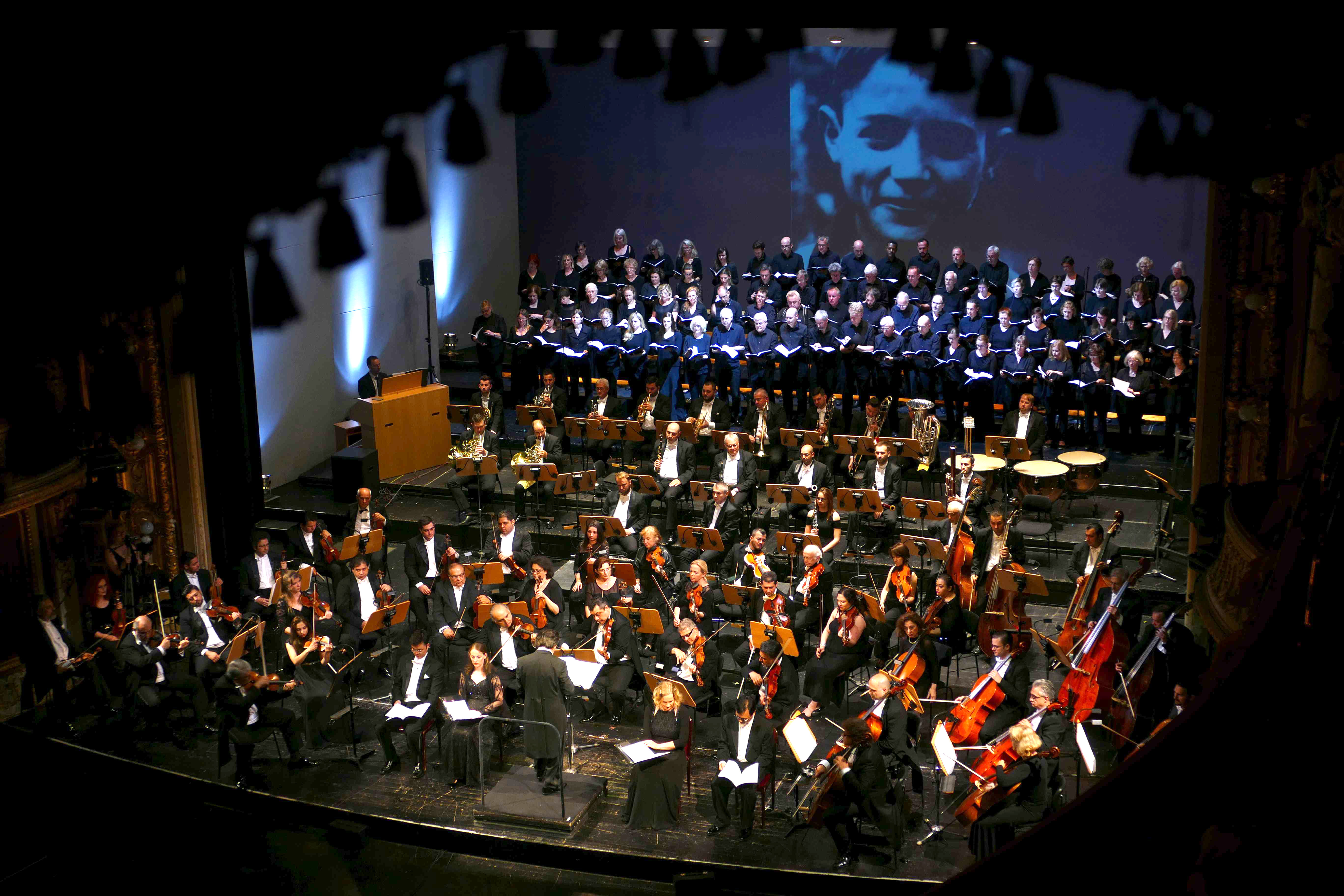 Die Roma und Sinti Philharmoniker mit Solisten und der Frankfurter Singakademie mit dem "Requiem für Auschwitz" von Roger Moreno-Rathgeb im Hessischen Staatstheater Wiesbaden